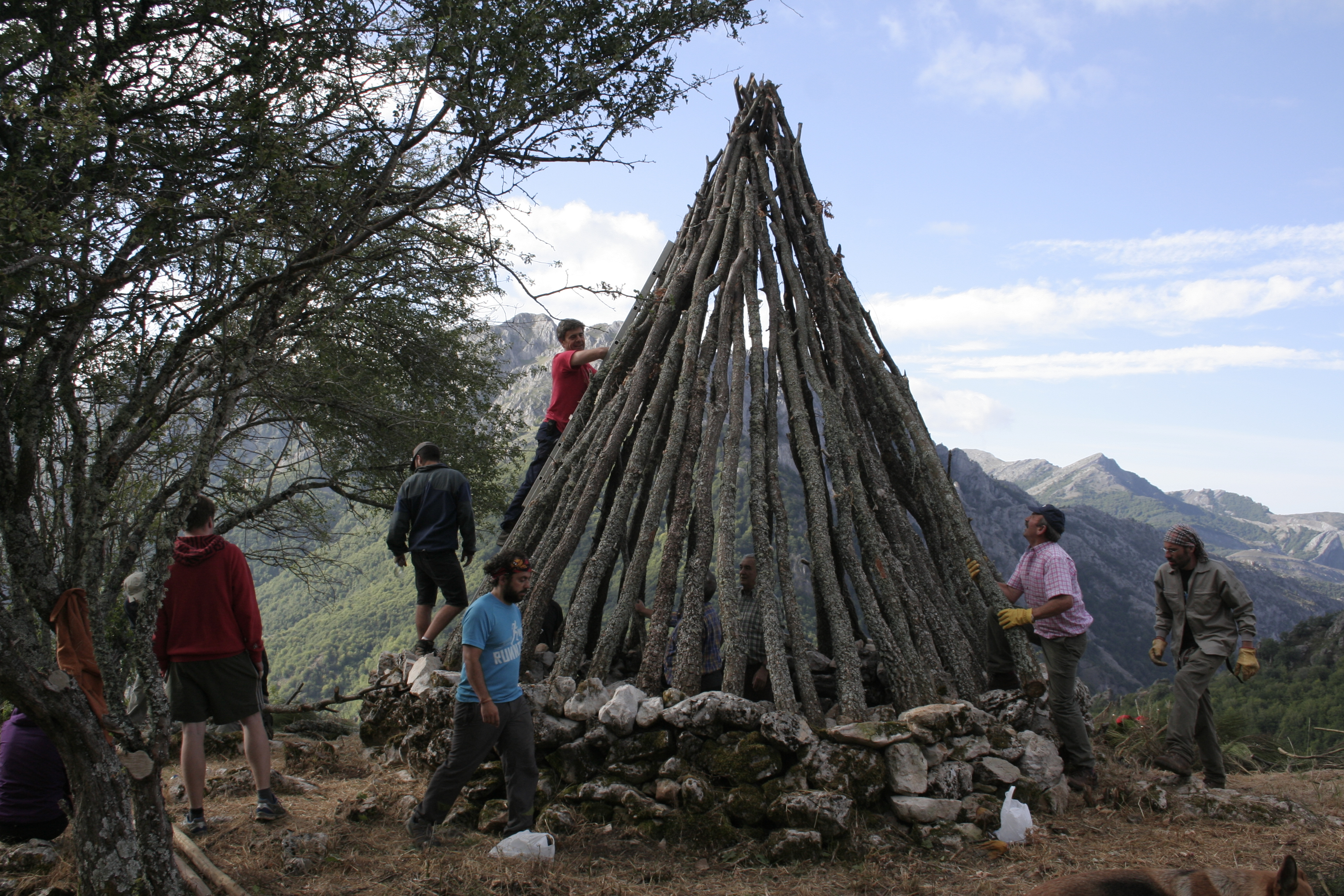 proceso de reconstrucción del chozo de matascalentes , en la localidad leonesa de Las Salas